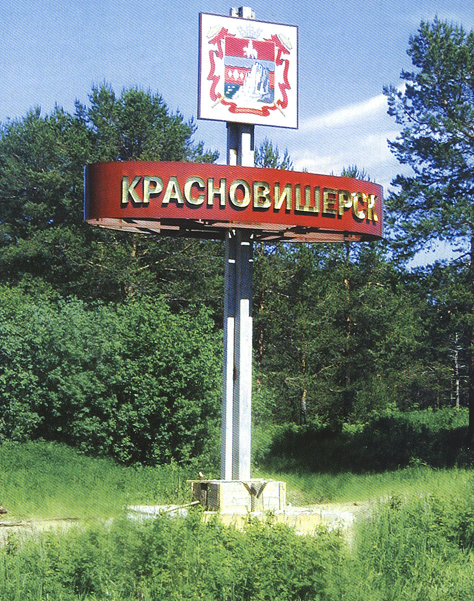 на въезде в город